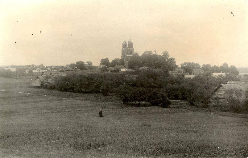 Беларуская (тарашкевіца): Тургелі (Turgieli). Касьцёл